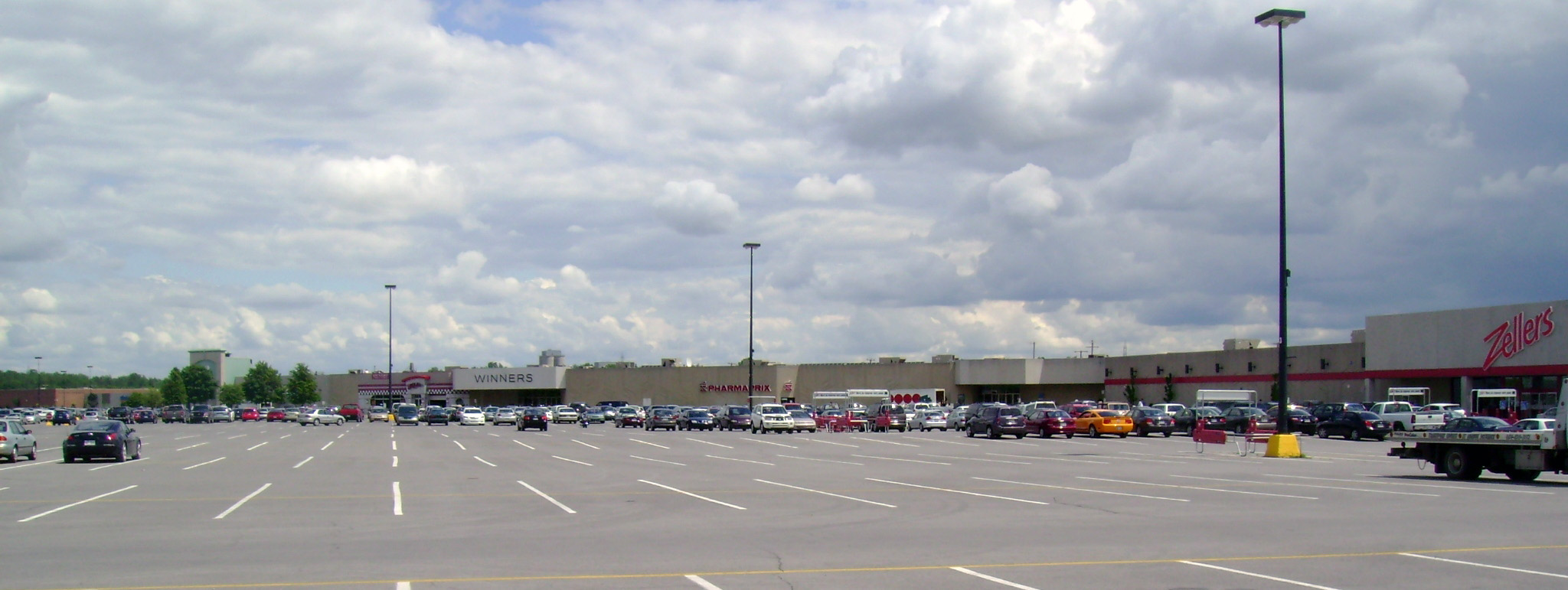 Galeries Joliette vues du stationnement